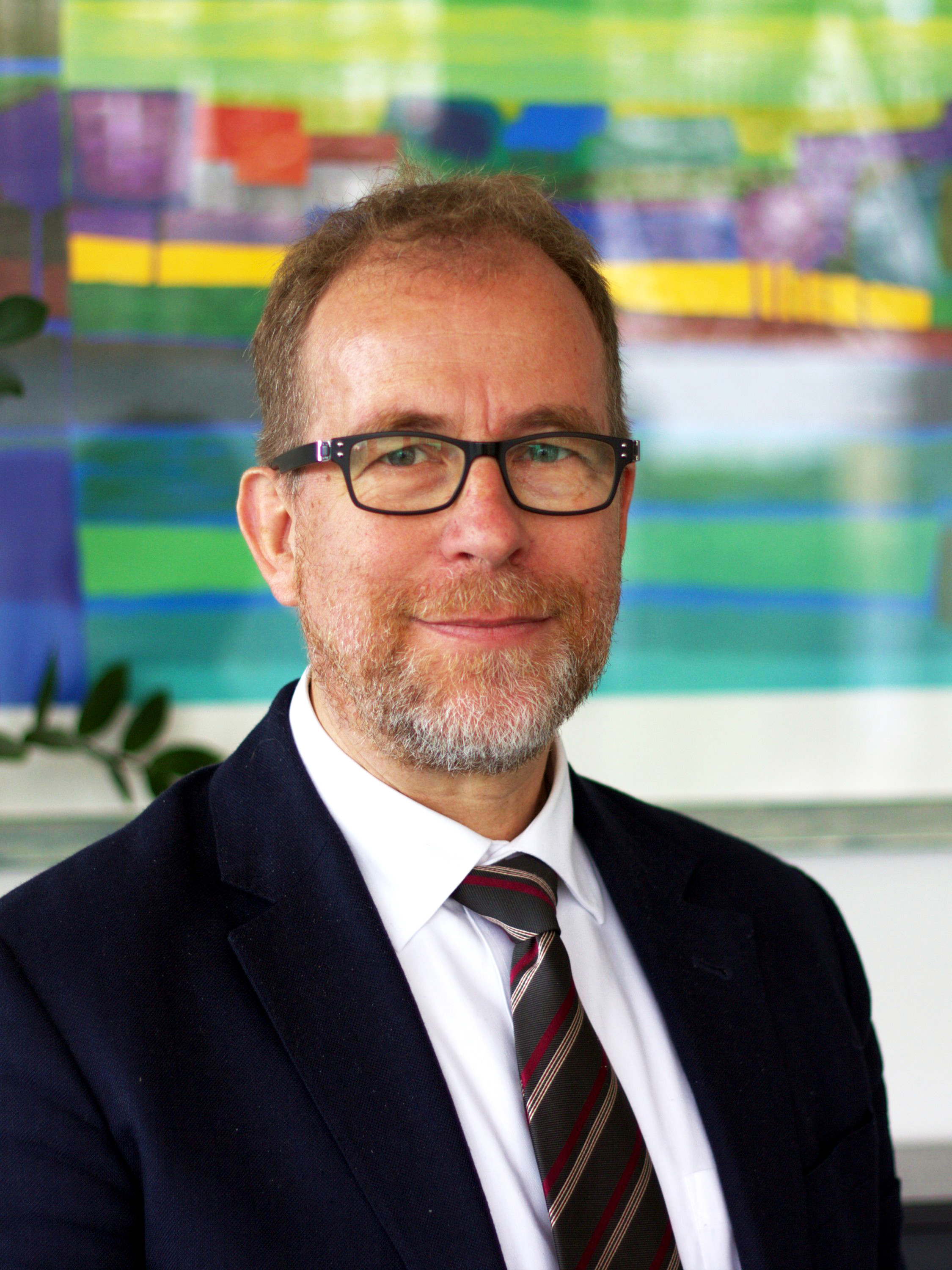 Portraitbild von Christof Veit